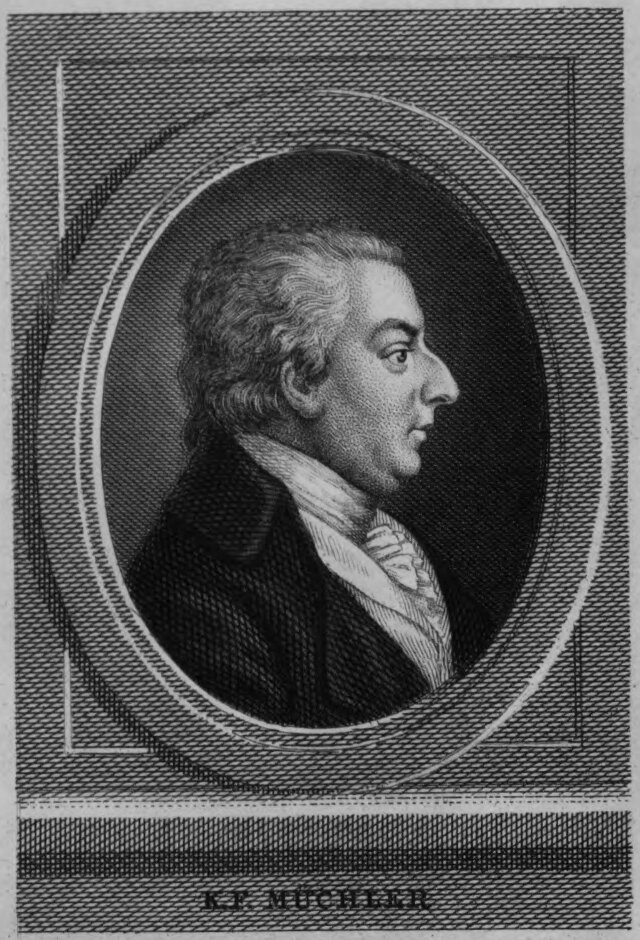 Karl Friedrich Müchler. In: Ausgewählte Gedichte : mit Biogr. u. Portr. Müchler, Karl. Verlagsort: Hildburghausen [u.a.] | Erscheinungsjahr: [ca. 1870] | Verlag: Bibliogr. Inst. [u.a.]